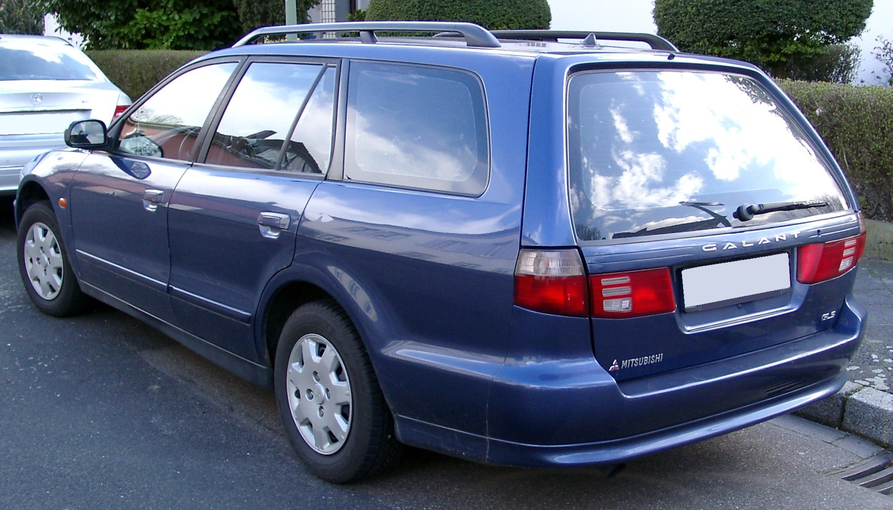 Mitsubishi Galant Kombi, 8. Generation